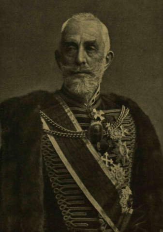 Hungarian minister Gyula Széchényi